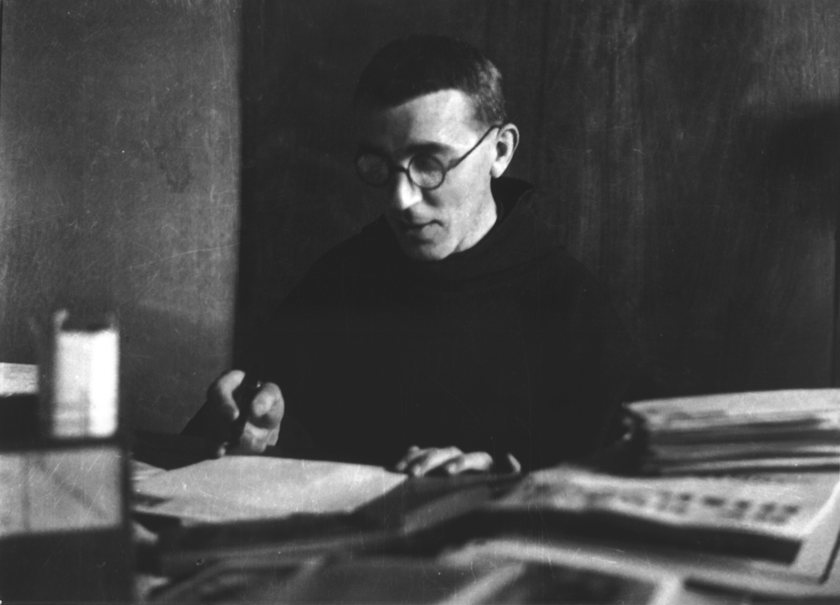 Placido cortese alla scrivania